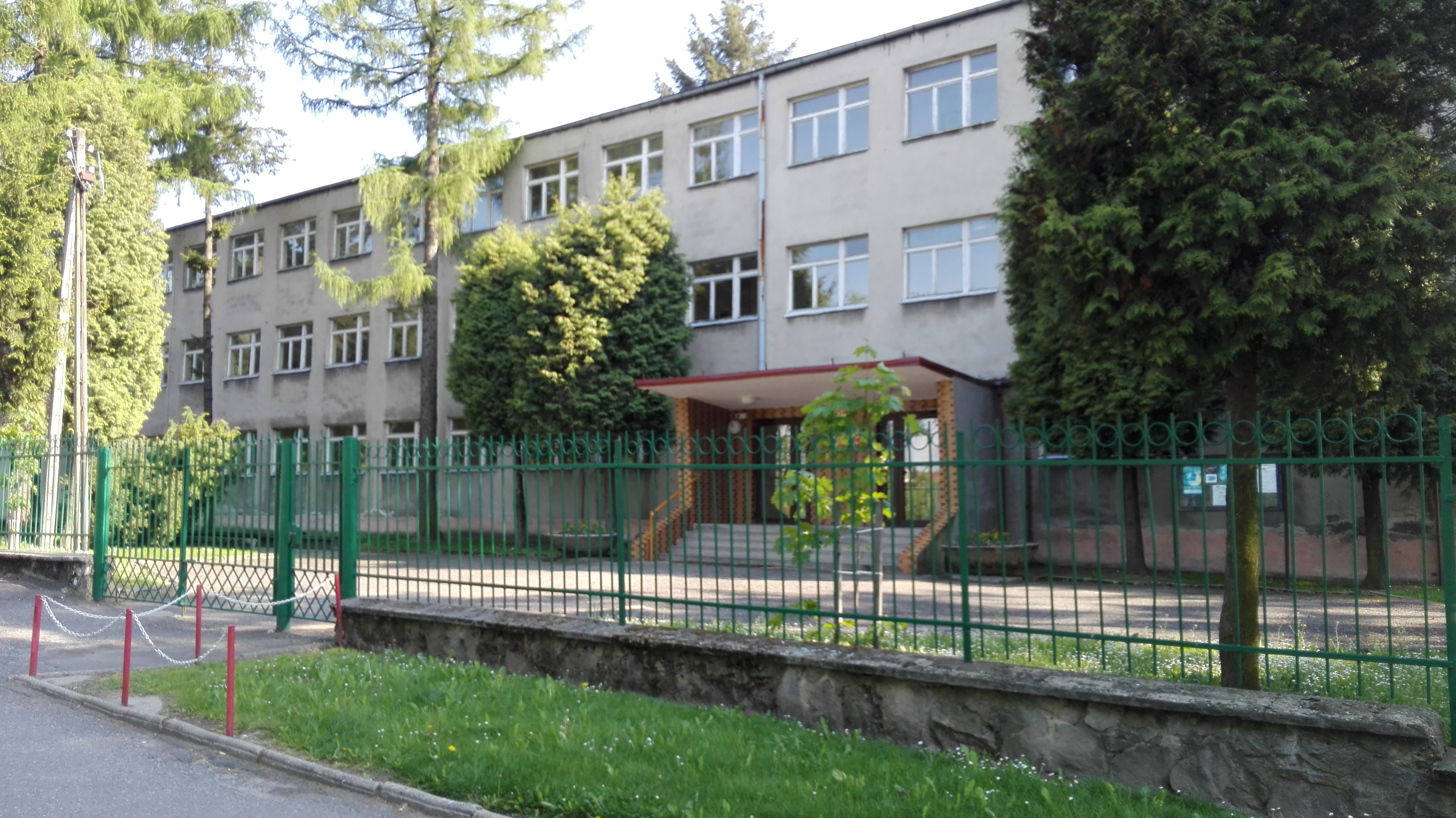 Prudnik, osiedle Jesionowe Wzgórze. Zespół Szkół Zawodowych nr 1 — W skład zespołu wchodzą: Zasadnicza Szkoła Zawodowa Nr 1, Zasadnicza Szkoła Zawodowa Nr 3, I Liceum Profilowane, Technikum Nr 1, Uzupełniające Licem Ogólnokształcące, Technikum Uzupełniające, Szkoła Policealna, Ośrodek dokształcania Zawodowego